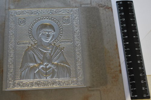 Штамп площадью 120 кв. см, изготовленный на электрохимическом станке ЭХФ-А1